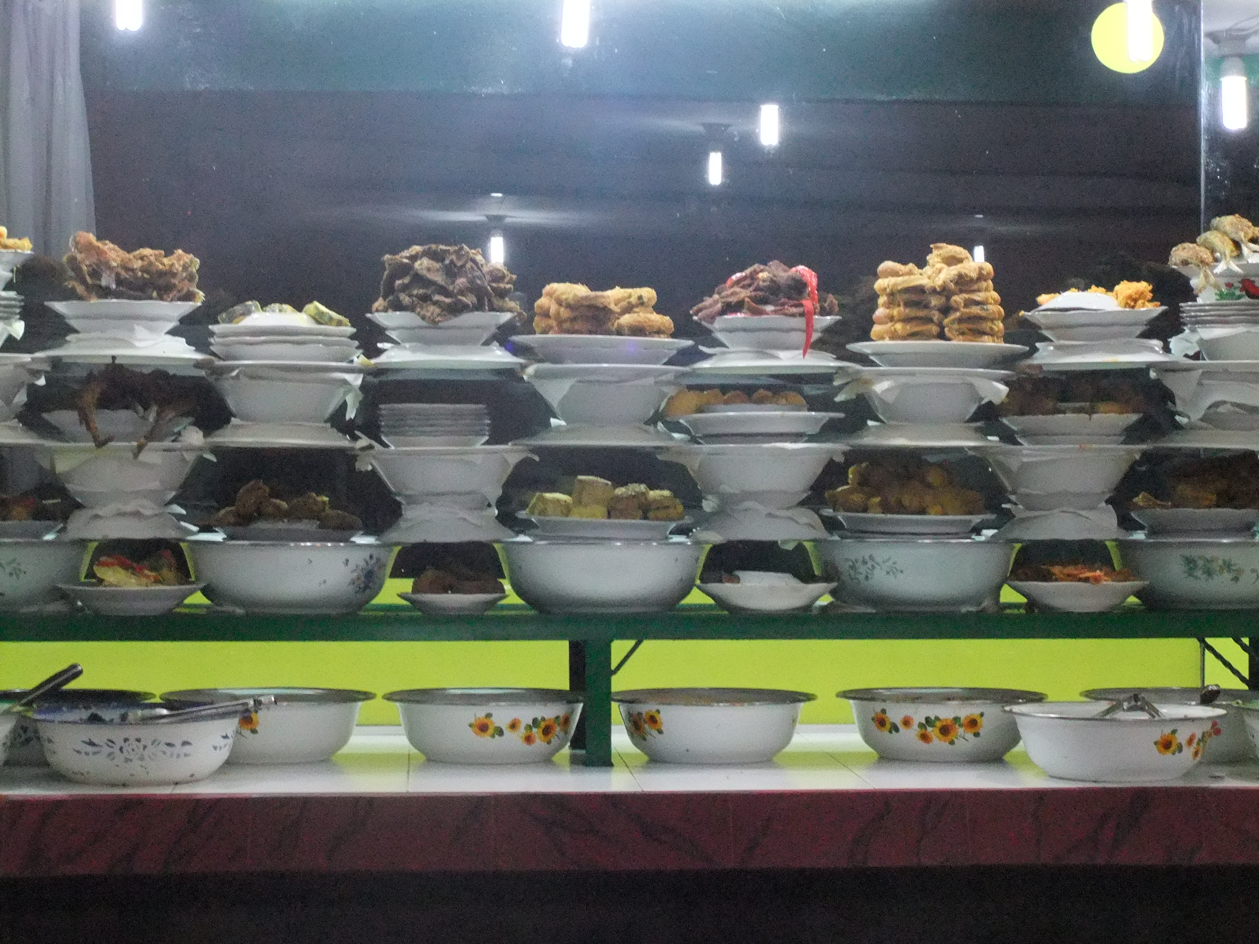 Hidangan di rumah makan Padang, Nusa Dua, Bali